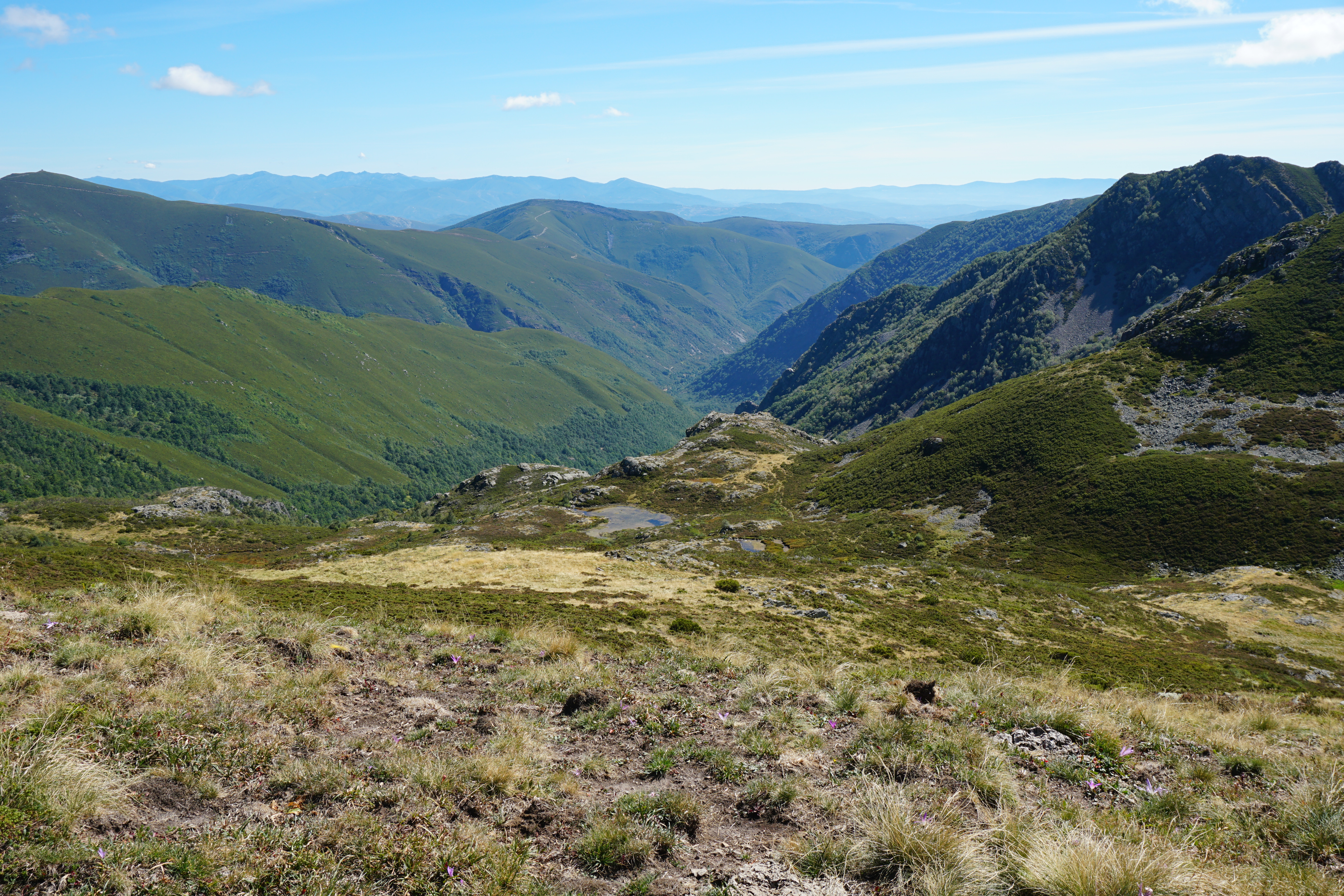 Ancares - Courel This is a photography of a Special Area of Conservation in Spain with the ID: ES1120001. Natura2000 entry, EEA entry